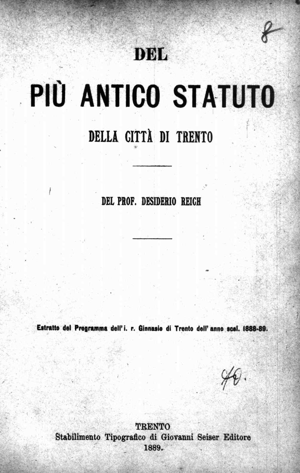 Frontespizio